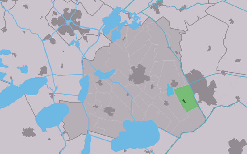 Kaartsje fan himrik fan Rottum